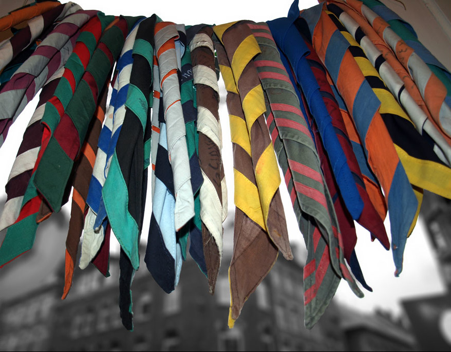 GCBImage:GCB